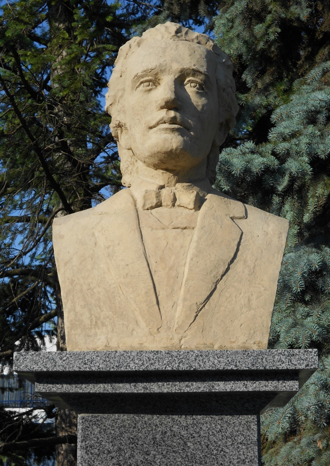 Bustul lui Mihai Eminescu din Aleea Clasicilor Culturii Naționale din Bălți